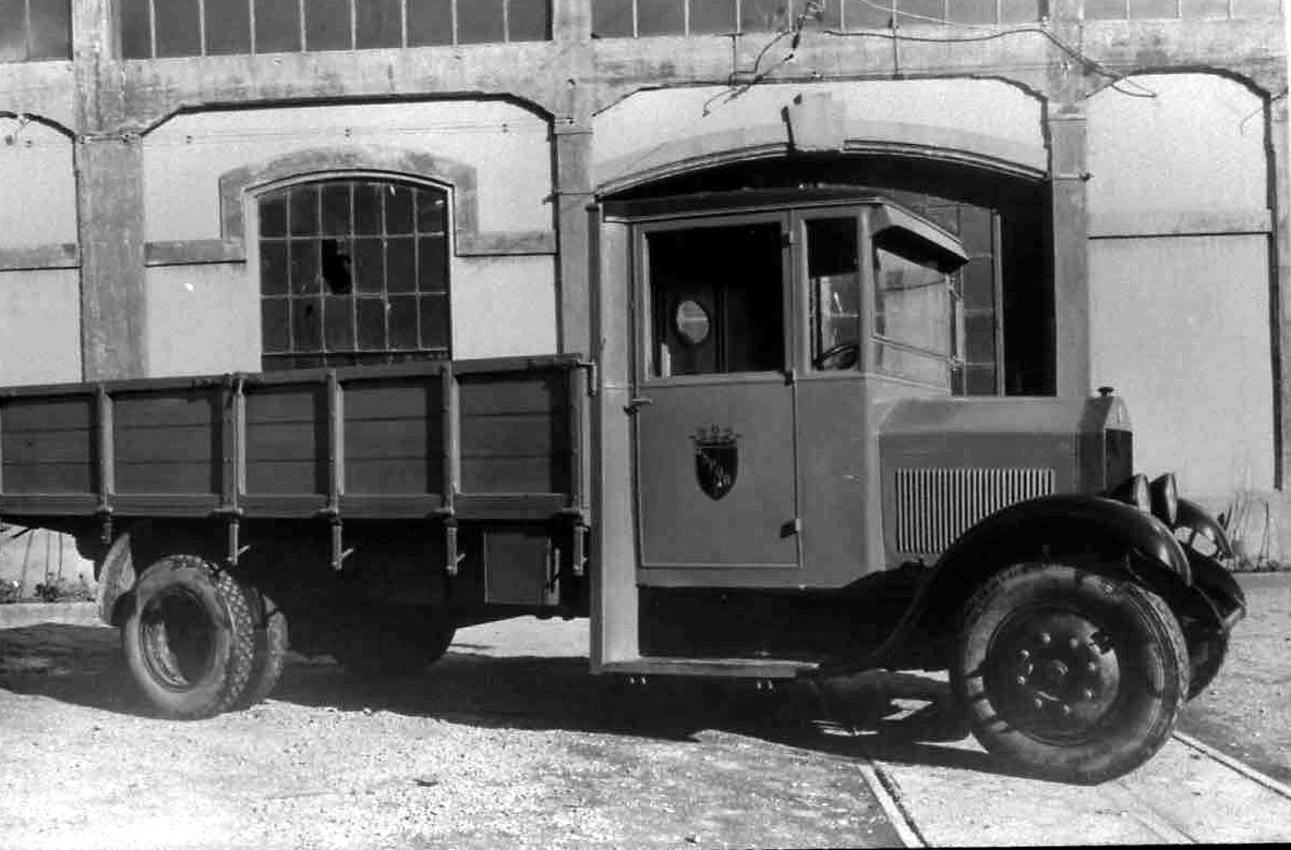 Autobus ATAG Lancia Eptajota trasformato in autocarro.